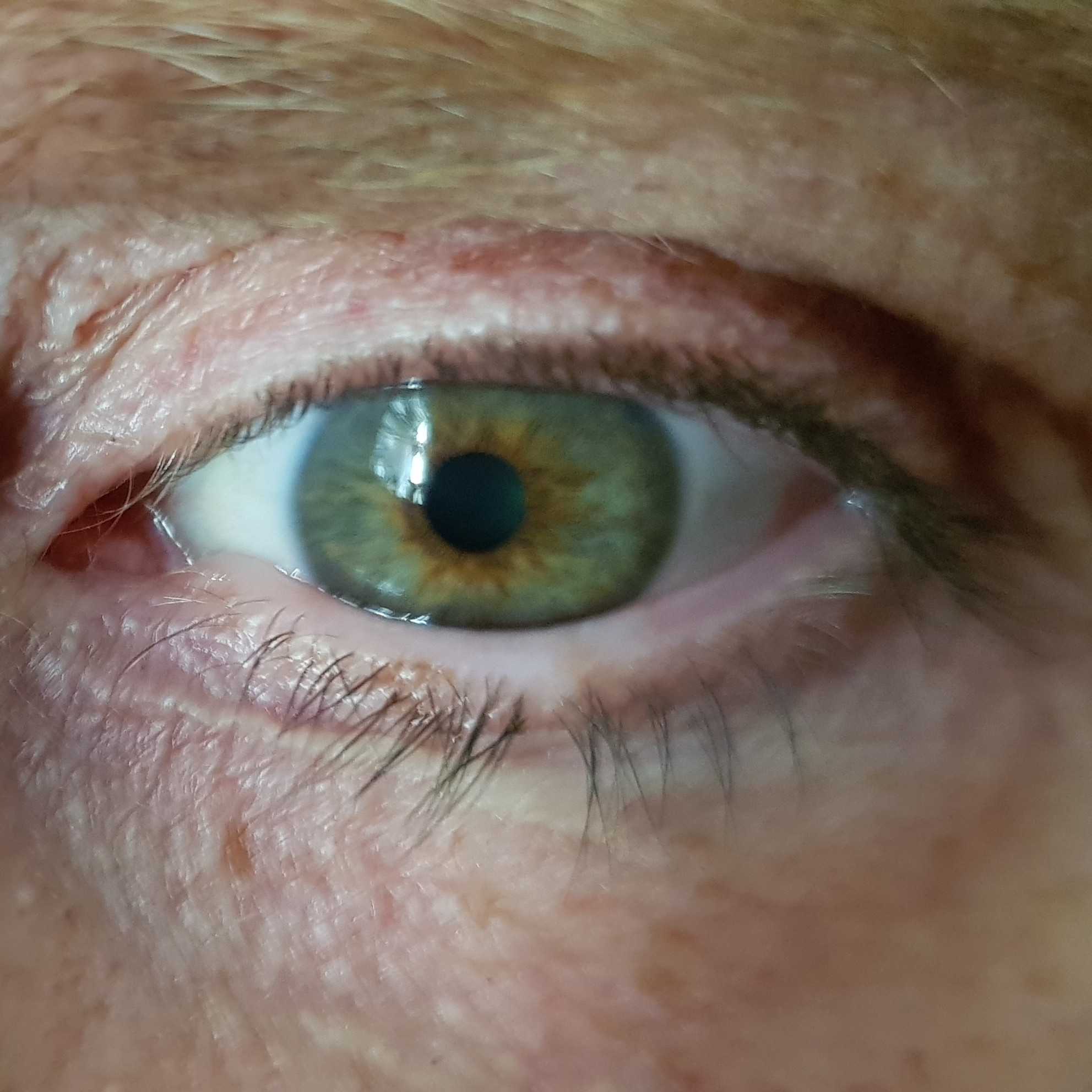 Konjunktiv injeksjon (conjunctival injection) eller rødt øye i forbindelse med klasehodepine (CH) er vanlig, her tydelig i høyre øyekrok (present at the right side)